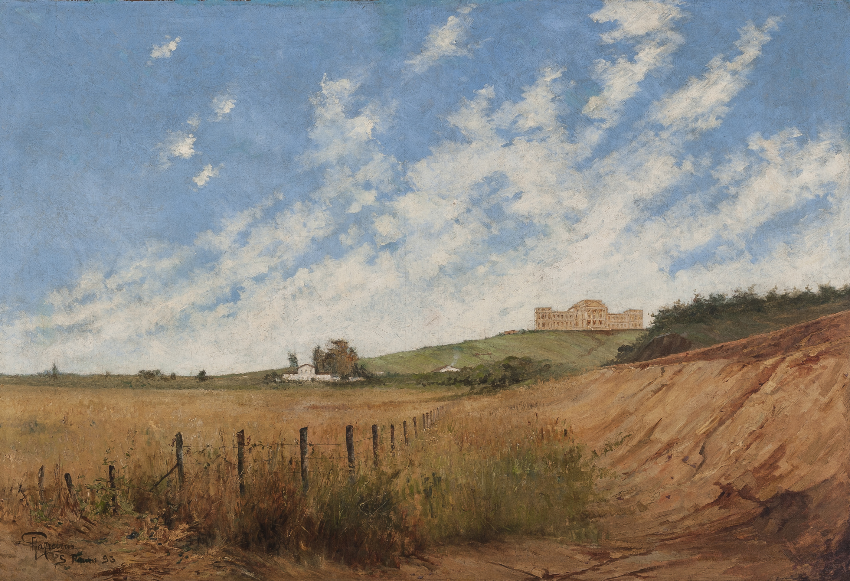 Obra que integra o acervo do Museu Paulista da USP. Coleção Fundo Museu Paulista - FMP